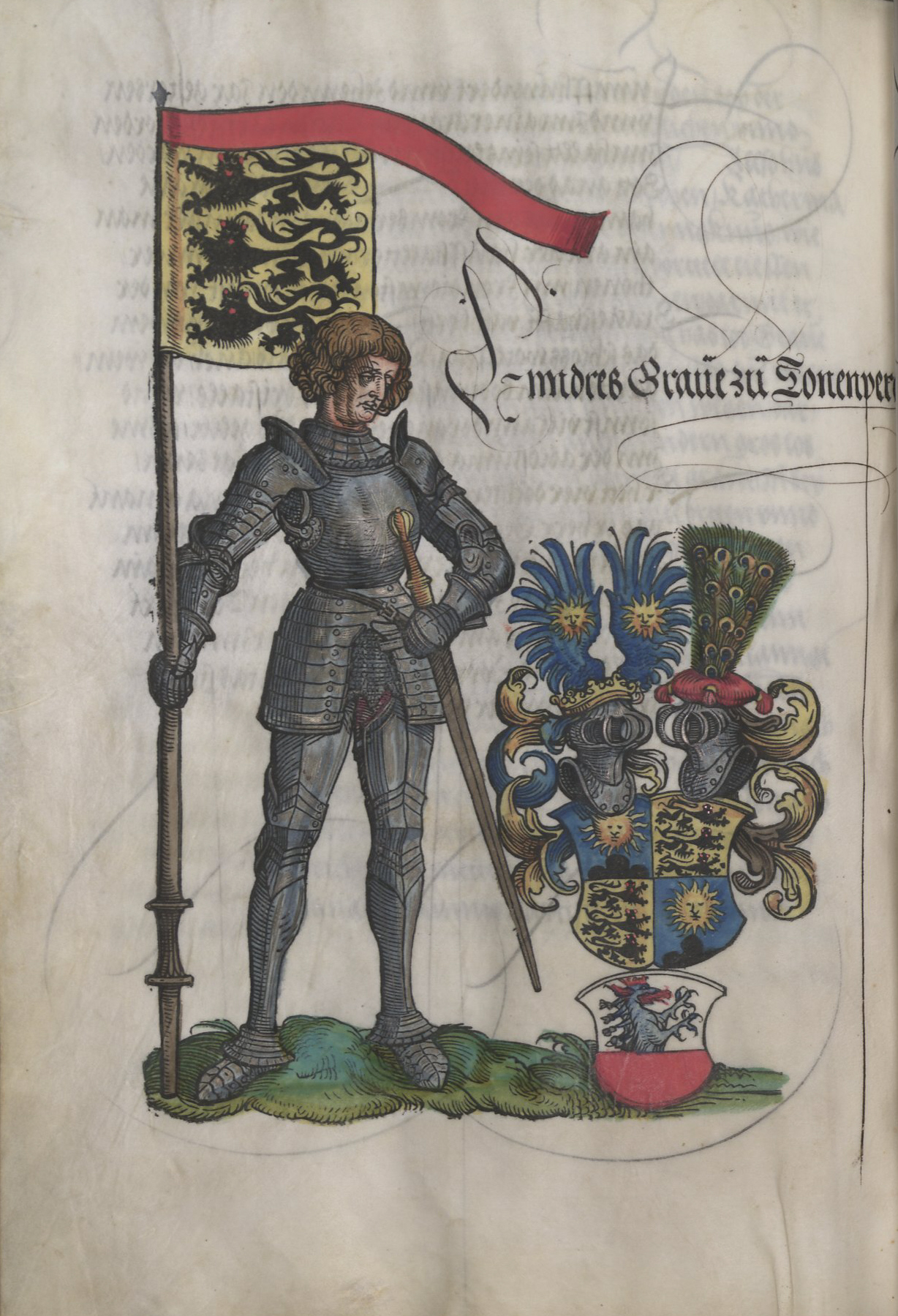 Holzschnitt aus der Chronik der Truchsessen von Waldburg (Truchsessenchronik) in der Pergamenthandschrift der Württembergischen Landesbibliothek Stuttgart (ehemals Fürstl. Bibliothek Donaueschingen), Cod. Don. 590 Enndres Graue zu Sonenperg